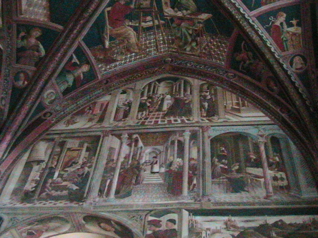 Atri- Cattedrale di Santa Maria Assunta - Affreschi dell'interno